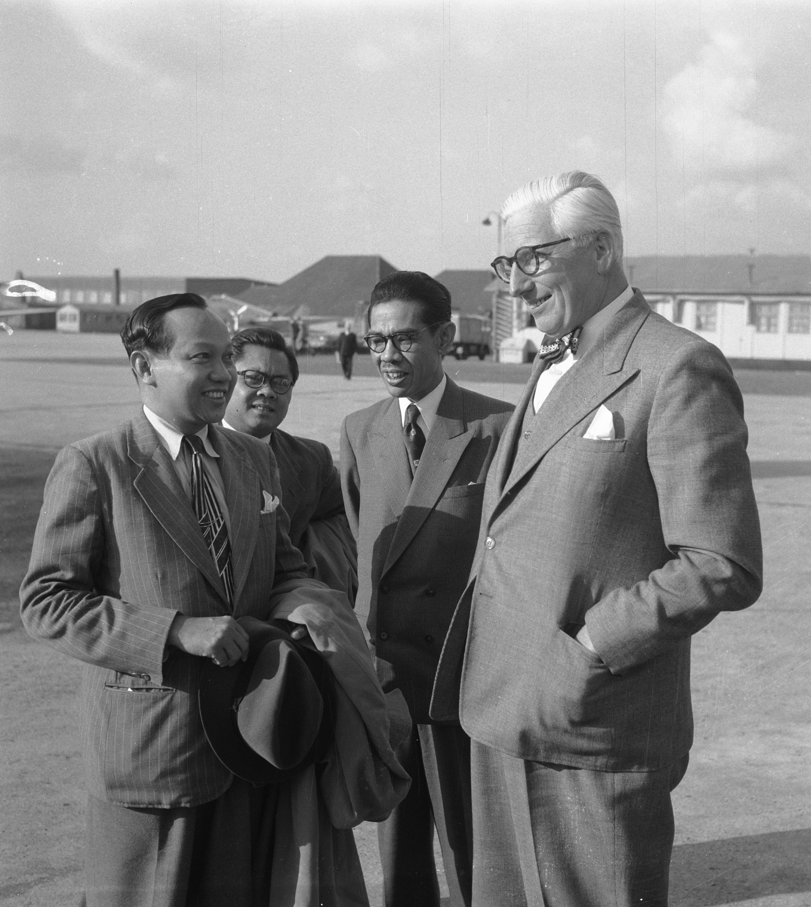 Collectie / Archief : Fotocollectie Anefo Reportage / Serie : [ onbekend ] Beschrijving : Aankomst Dr. Supomo op Schiphol Datum : 19 augustus 1951 Trefwoorden : AANKOMST Persoonsnaam : Dr. Supomo Fotograaf : Noske, J.D. / Anefo Auteursrechthebbende : Nationaal Archief Materiaalsoort : Negatief (zwart/wit) Nummer archiefinventaris : bekijk toegang 2.24.01.03 Bestanddeelnummer : 904-7302